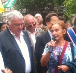 L'ex-députée européenne Chantal Cauquil en soutien à Gérard Filoche (à gauche).